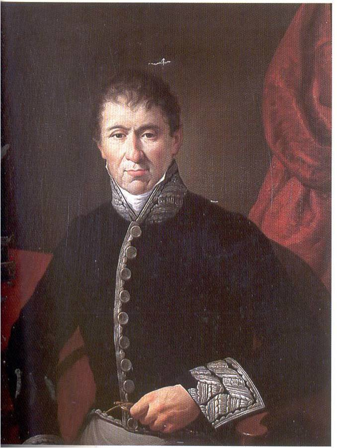 Retrato del politico y hacendista español Antonio Barata Barata (1772-1850), que llegó a ser ministro de Hacienda de España durante el Trienio Liberal, en el reinado de Fernando VII.